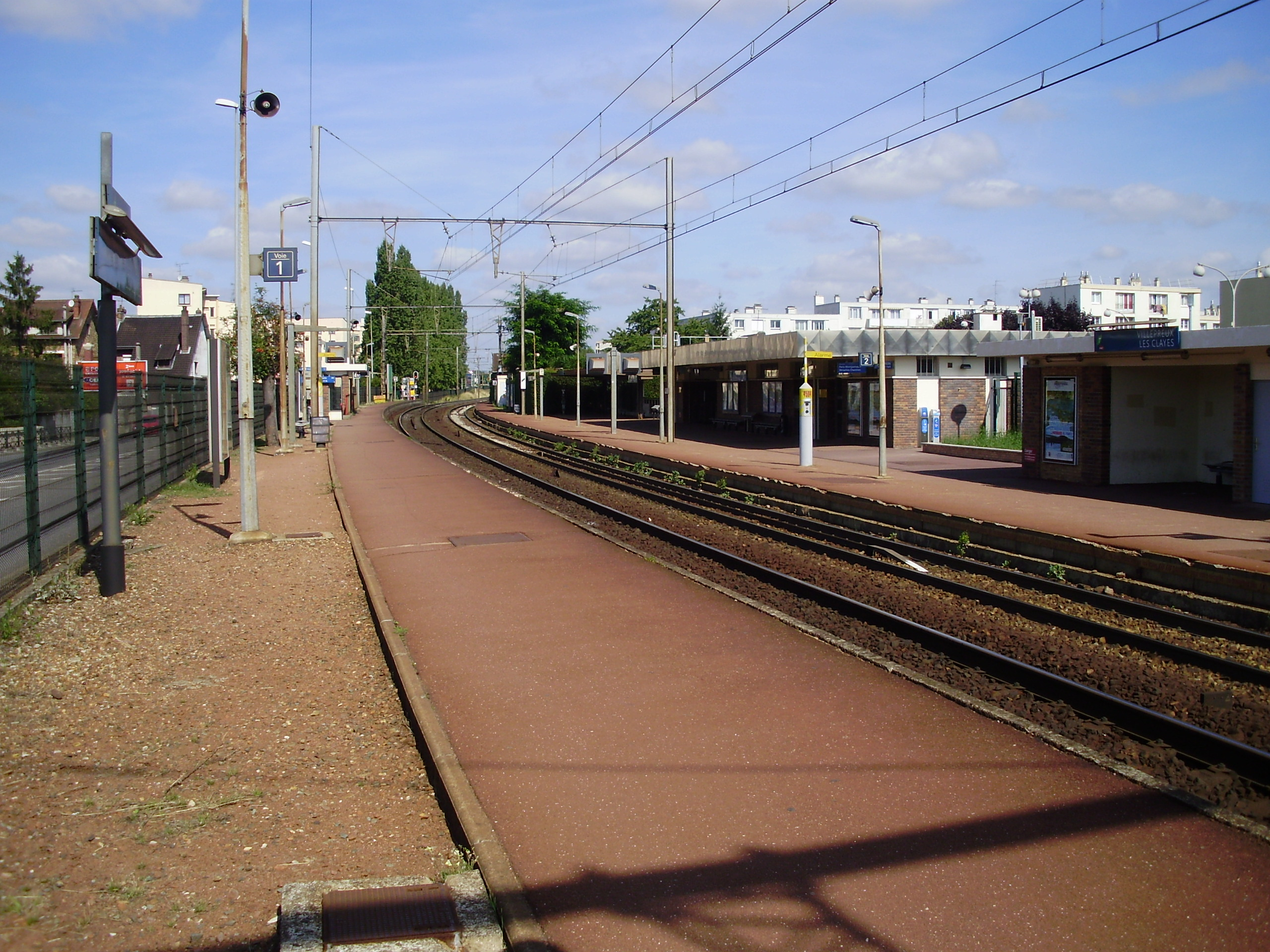 Gare de Villepreux - Les Clayes, sur le territoire de la commune des Clayes-sous-Bois, Yvelines, France : quais et voies en regardant vers Plaisir - Grignon